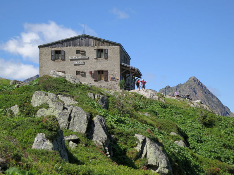 Refuge de Tré la Tête